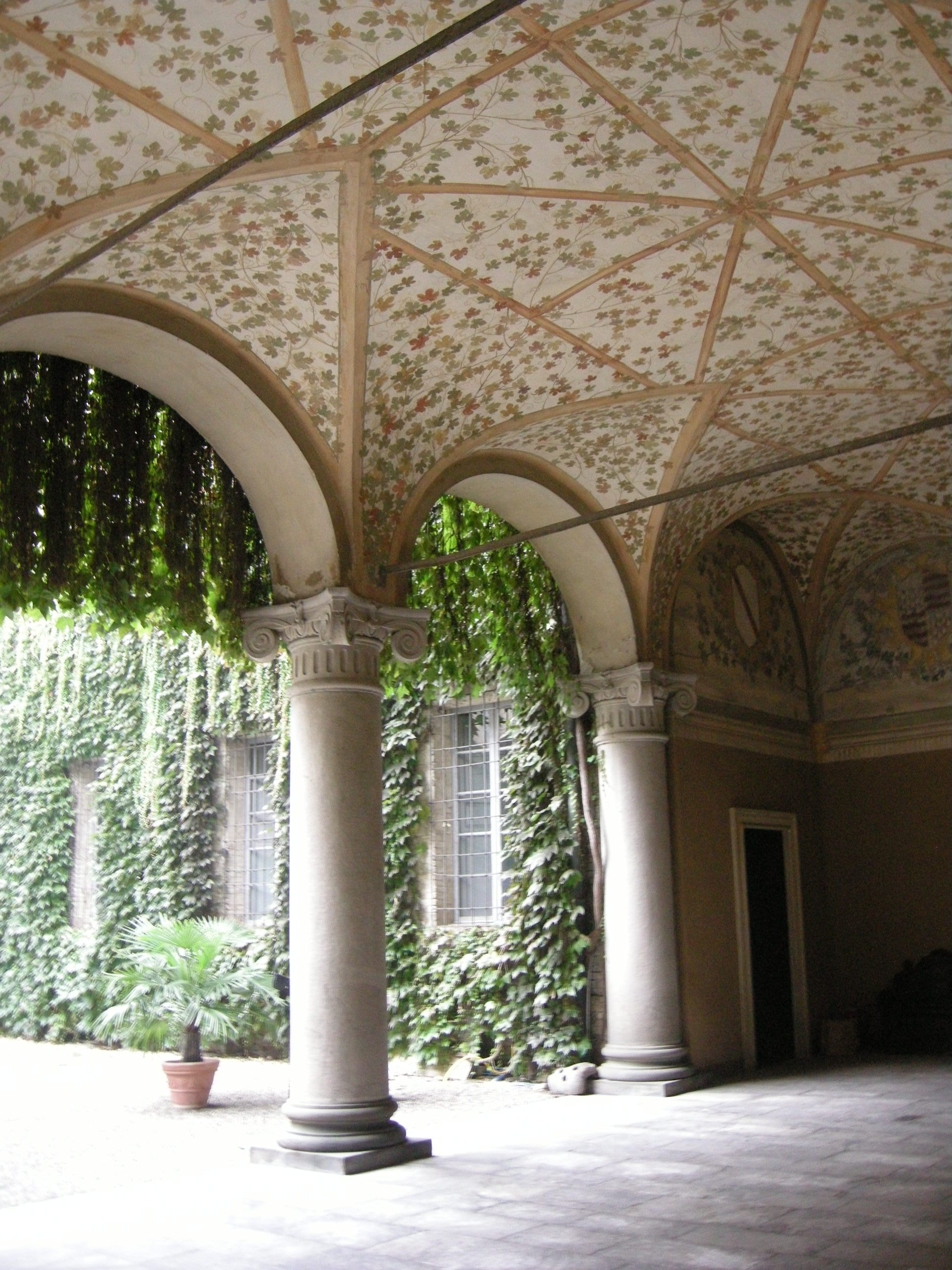 Soragna, rocca